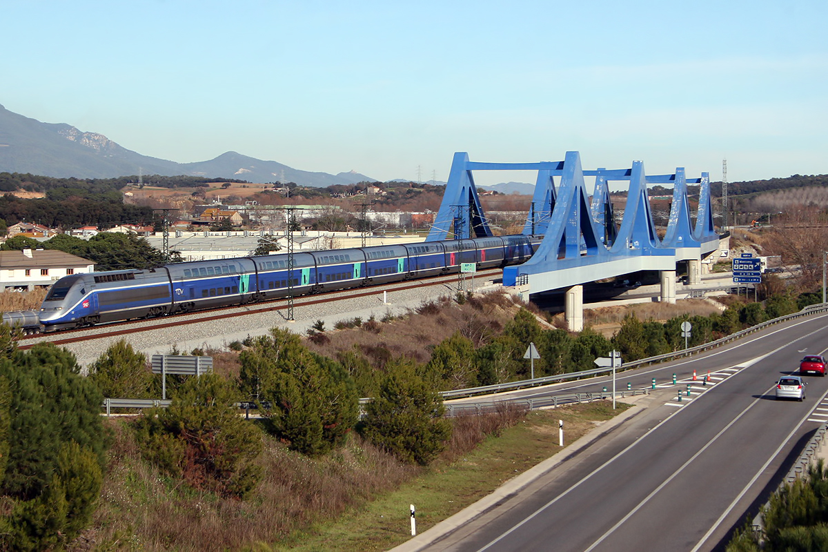 TGV Dayse (Marseille - Barcelona) - AP7 Llinars del Vallès